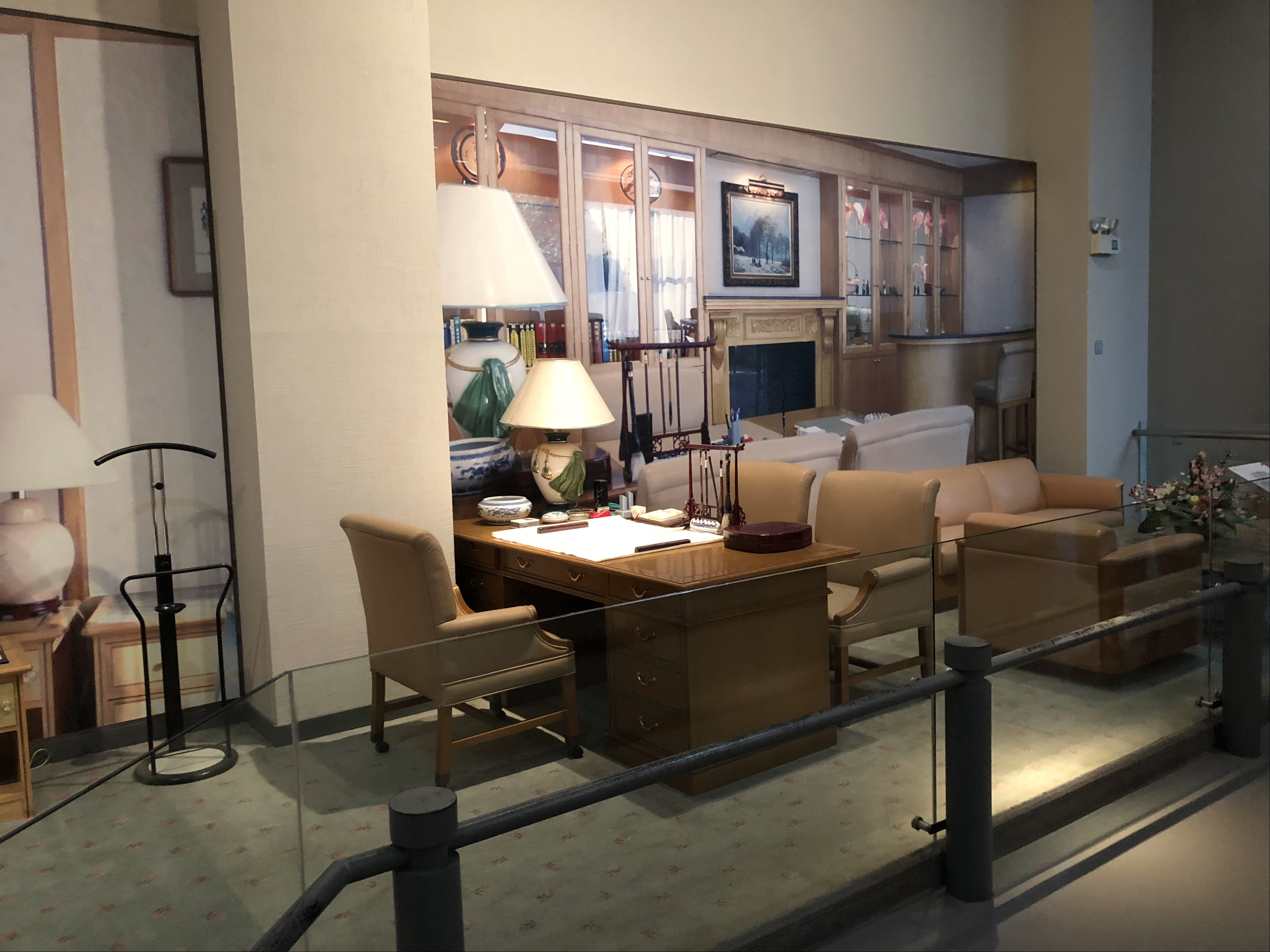 邓小平1984、1992两次访深圳下榻迎宾馆桂园楼。